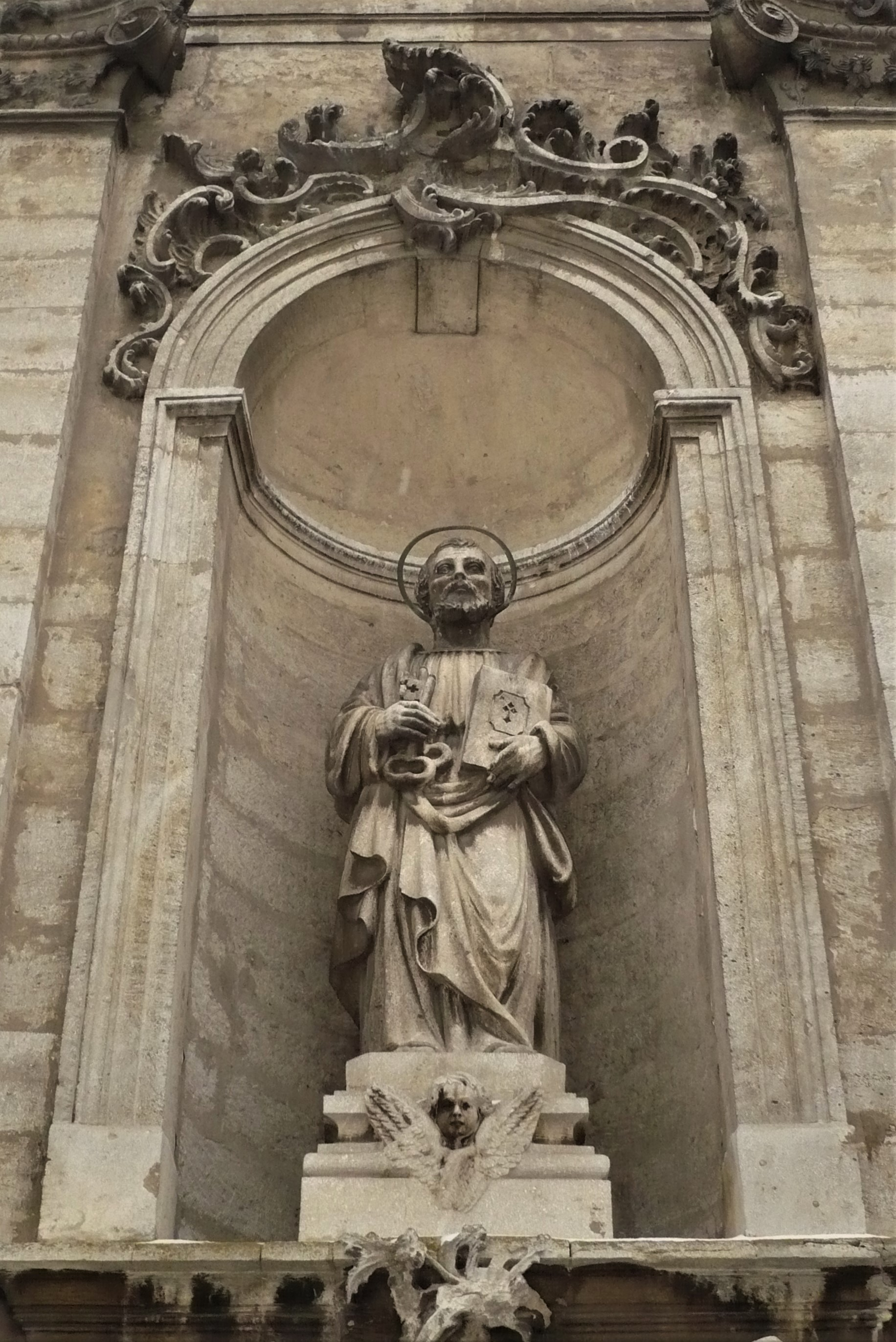 Kościół